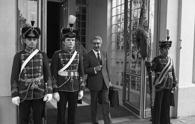 April-Scherz des Bundeskanzleramtes: Grenzschutzabteilung Bonn erhält Uniformen der Bonner Königs-Husaren. (Mitte: Gerhard Jahn)